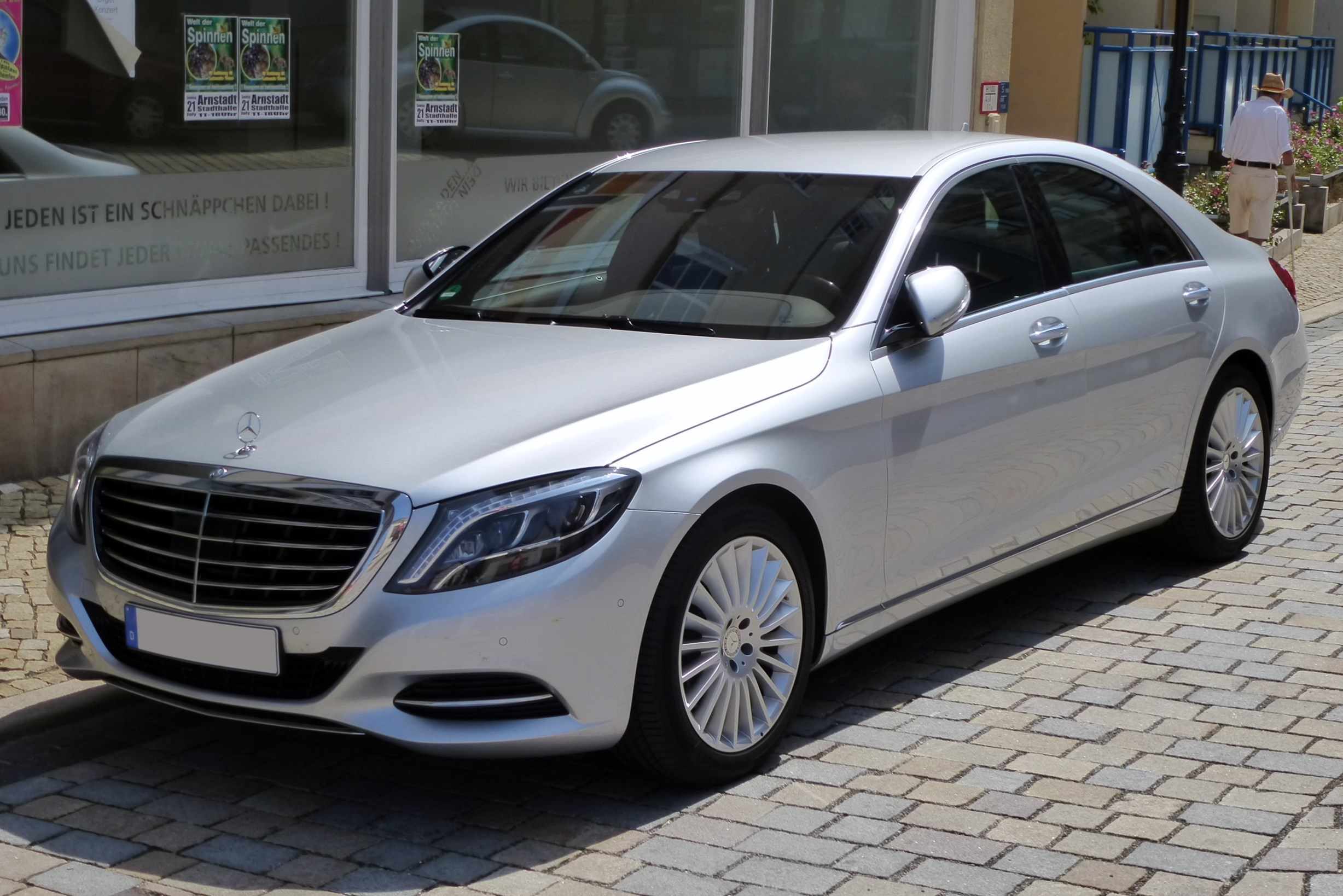 Mercedes-Benz W 222